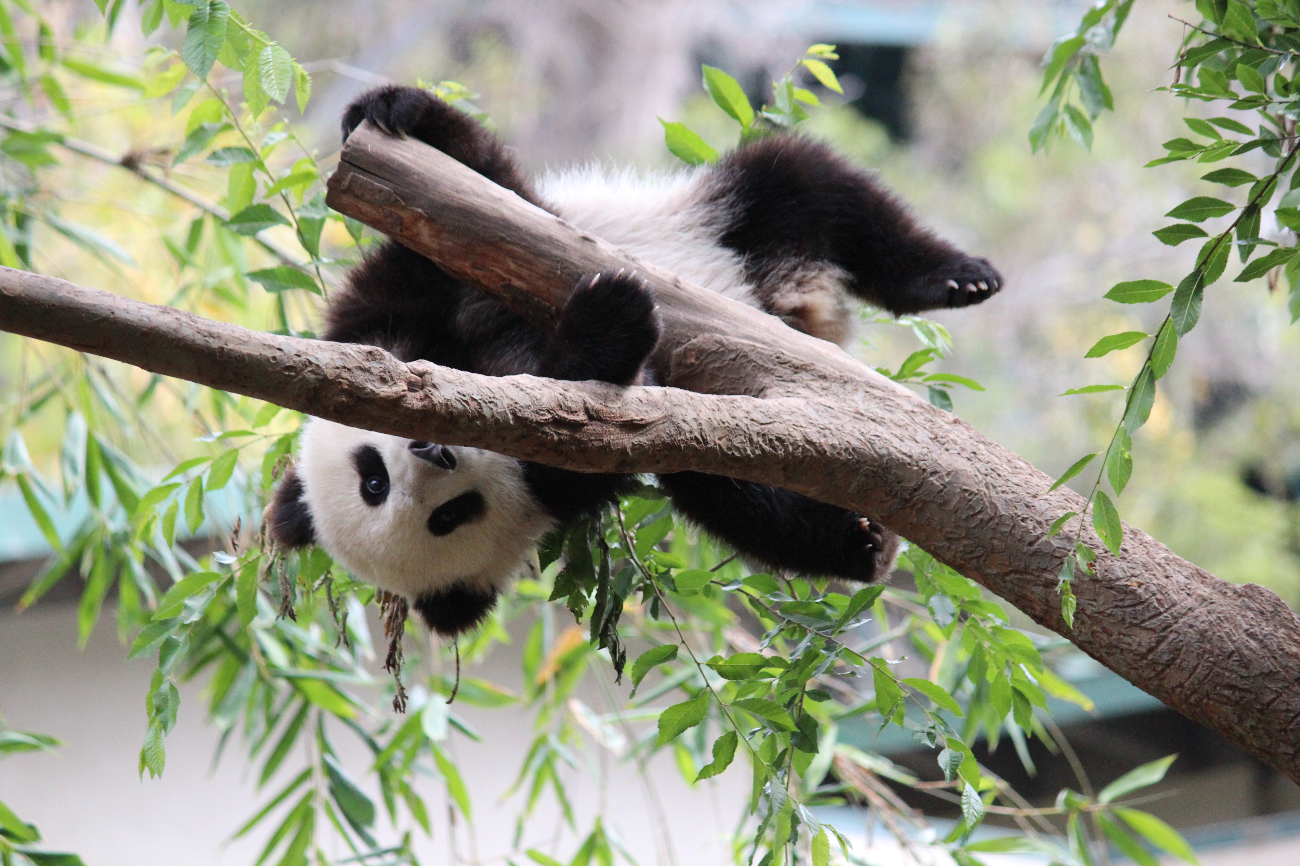 Mai 2013 - Foto: Johann Balleis